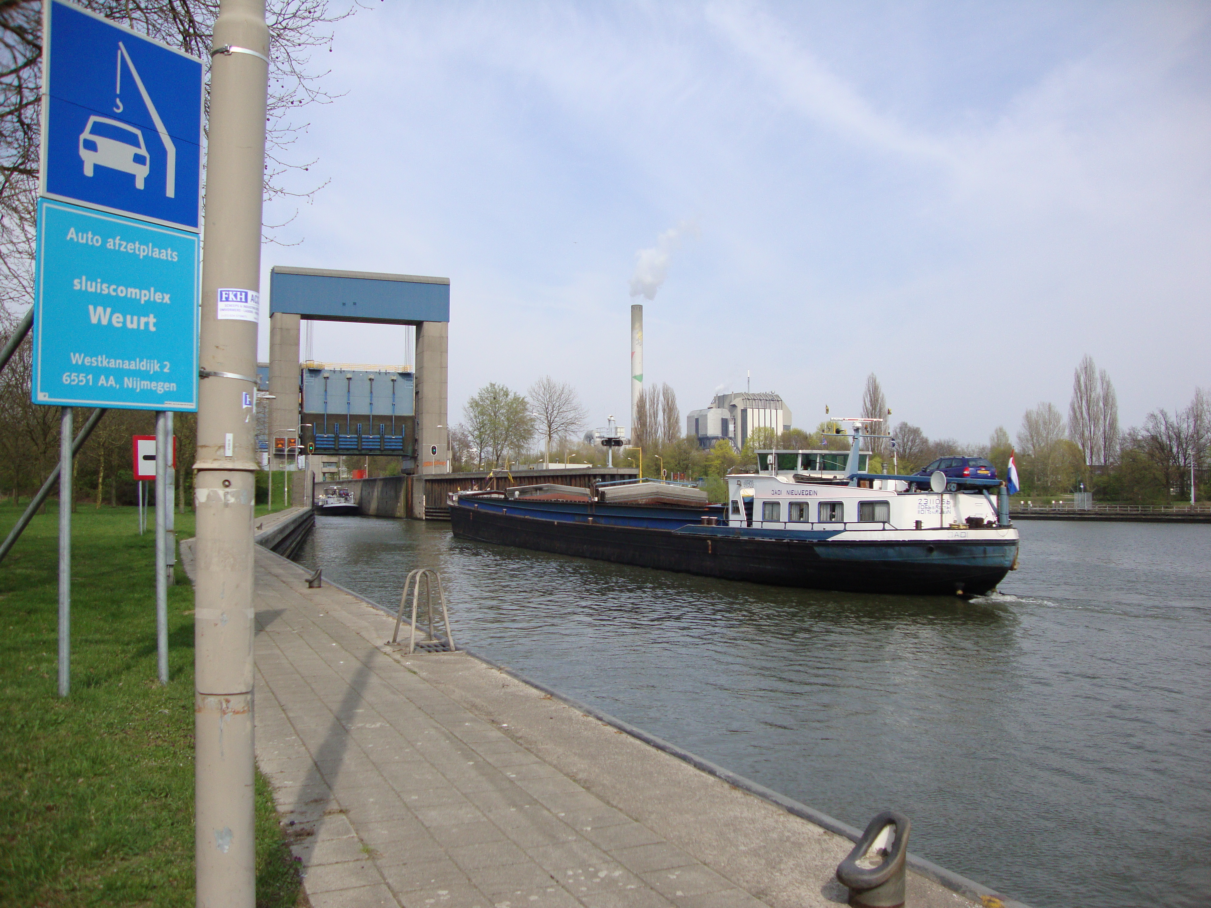 Nijmegen,_sluiscomplex_Weurt,_nieuwe_sluis,_zuidzijde_vanaf_aanlegkade_gezien.